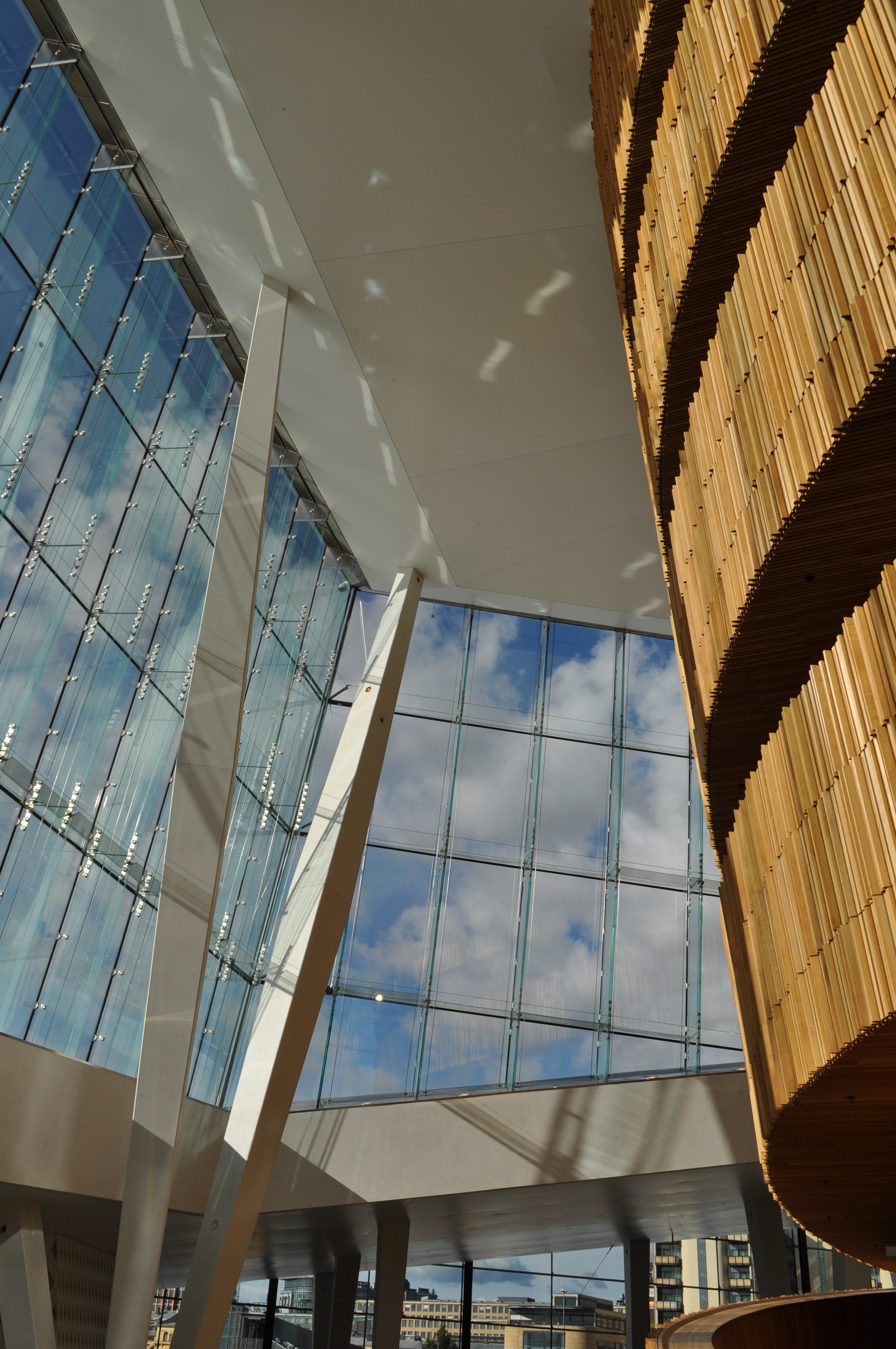 Innenansicht, neues Opernhaus, Oslo, Norwegen.